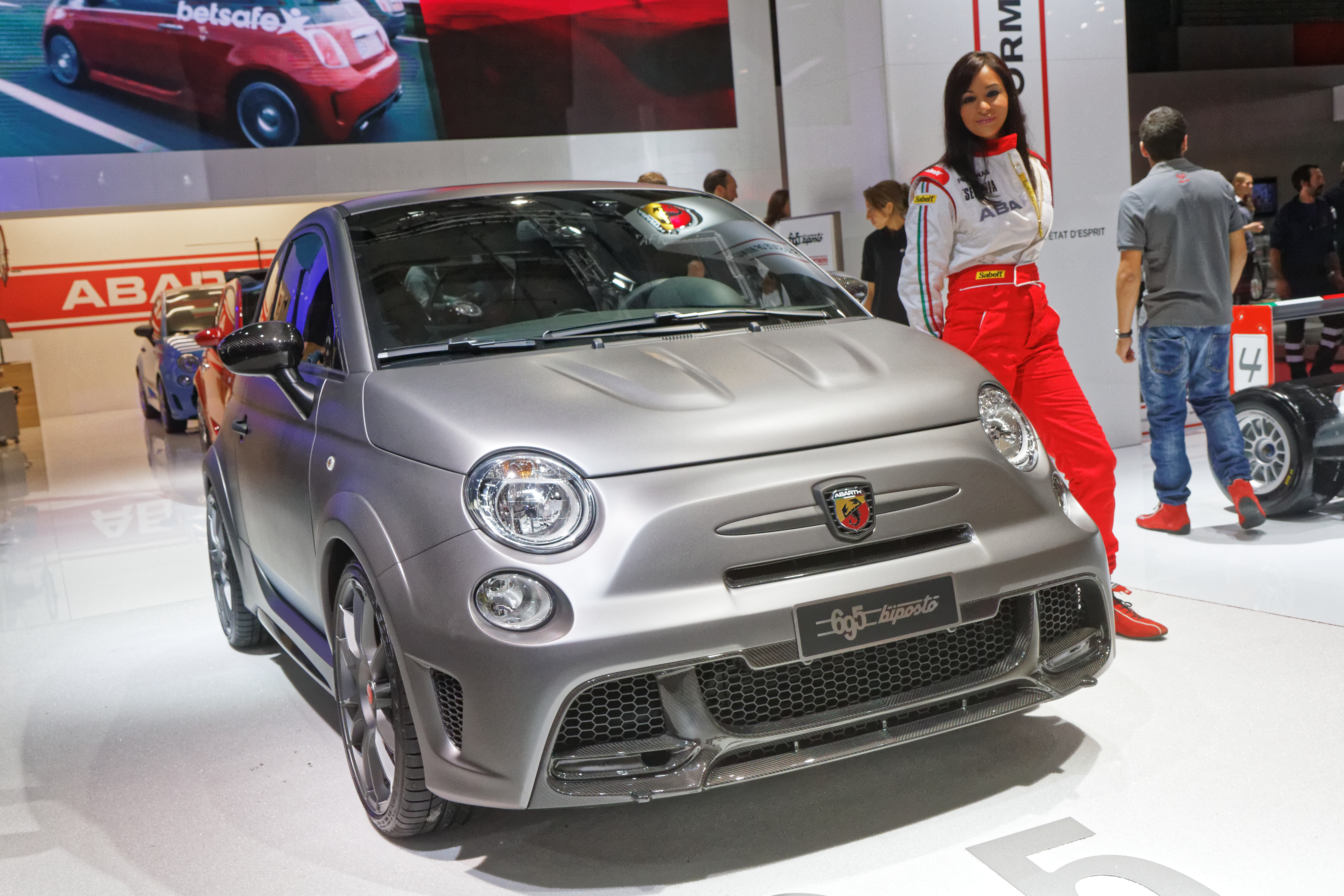 Une Abarth 695 biposto présentée lors du mondial de l'automobile de Paris 2014.